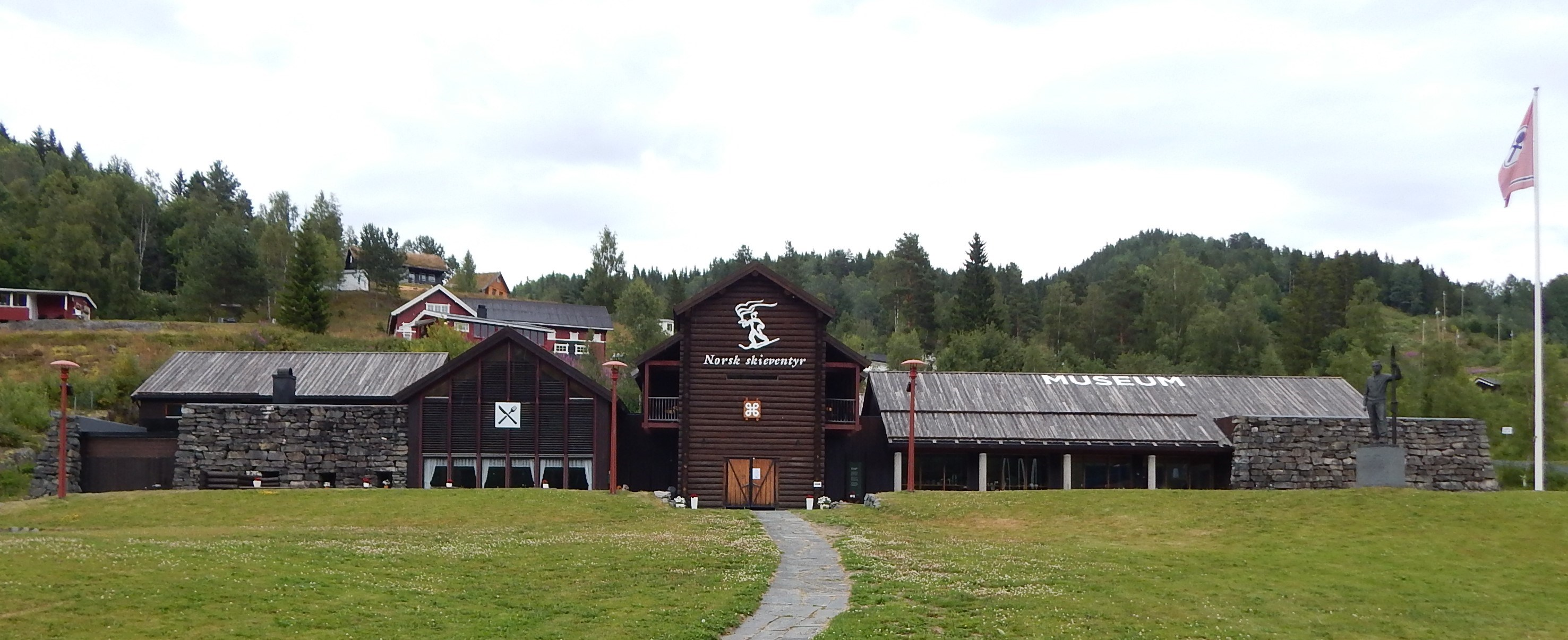 Norsk skieventyr i Morgedal